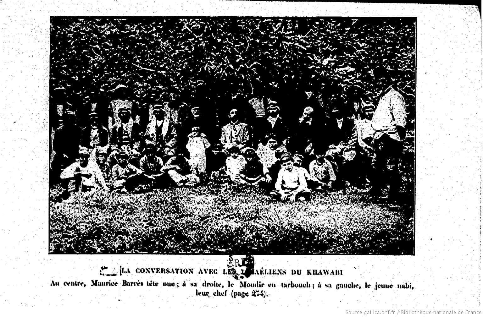 Maurice Barrès chez les Ismaëliens de Khawabi en Syrie (1914). Au centre, Maurice Barrès, tête nue ; à sa droite, le Moudir en tarbouch ; à sa gauche, le jeune nabi, leur chef. In Une enquête aux pays du Levant. Alexandrie, Plon-Nourrit, Paris, 1923.